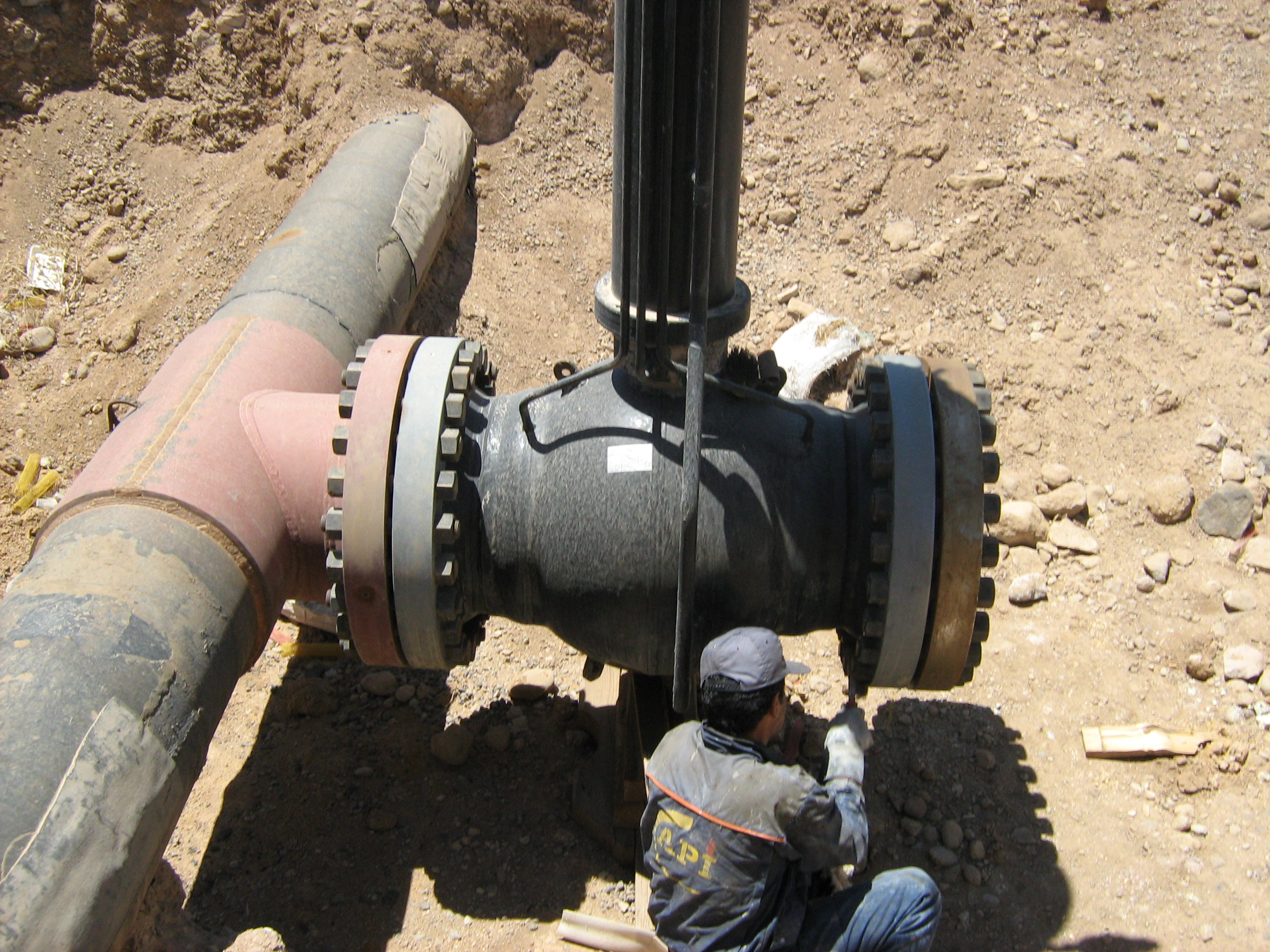 شیر فولادی با بدنه تمام جوشی و انتهای فلنجی - برای انشعاب گیری از خط اصلی(هات تب)